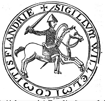 Vilém Flanderský